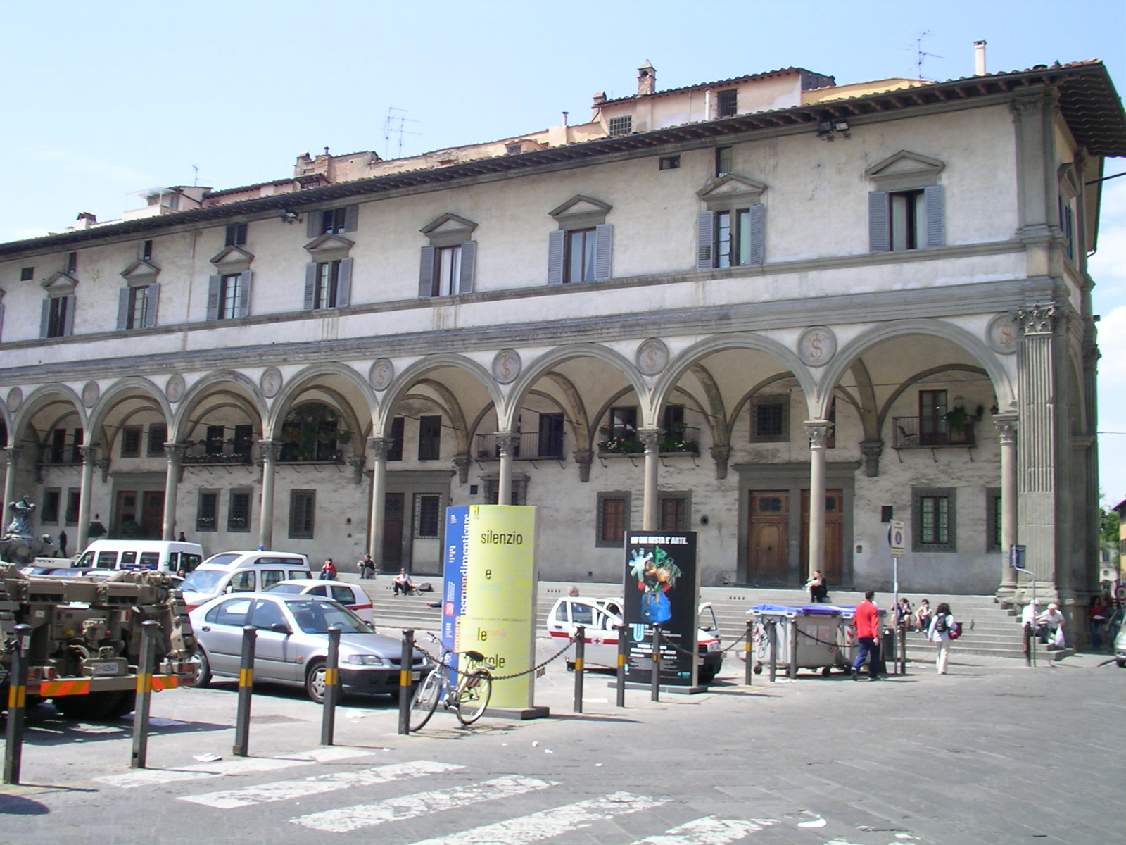 Loggiato dei servi dei Maria (dei Serviti) in Santissima Annunziata Square front view in Florence, Italy